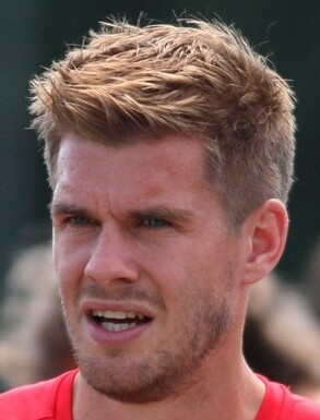 Simon Terodde beim VfB-Training. Aufgenommen von